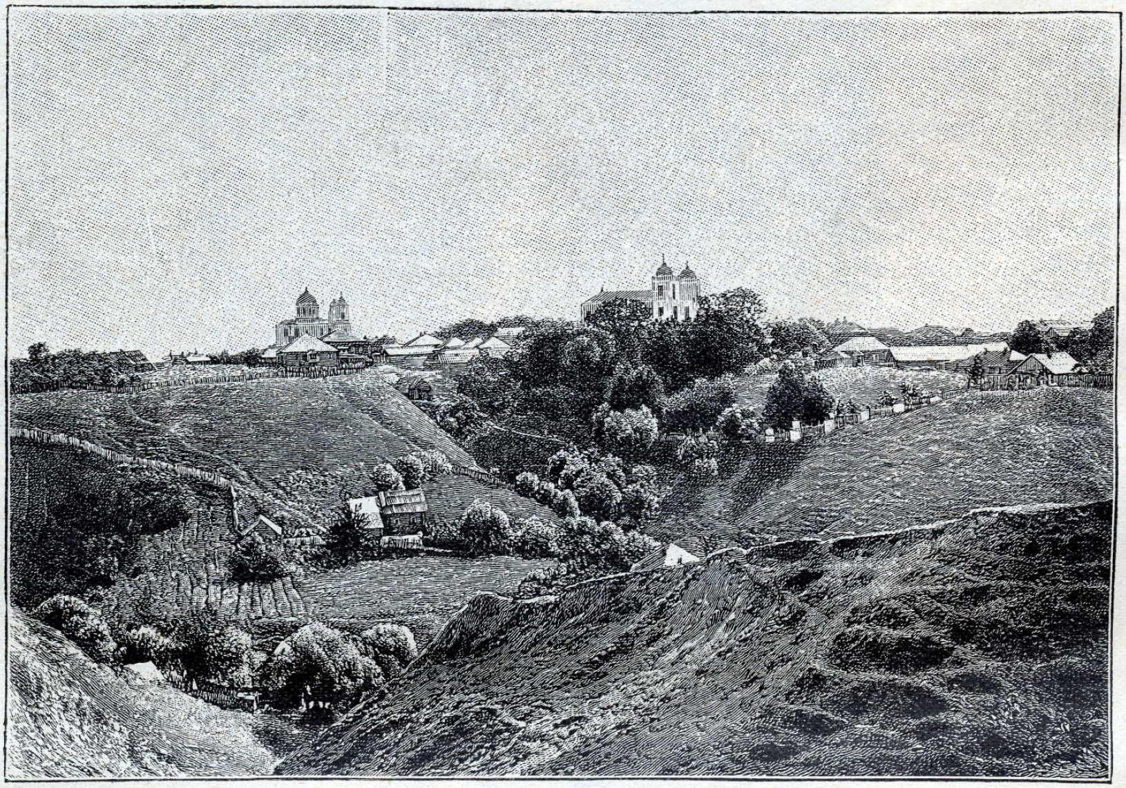 Беларуская (тарашкевіца): Амсьціслаў (Amścisłaŭ), Траецкая гара (Trajeckaja hara). Панарама места